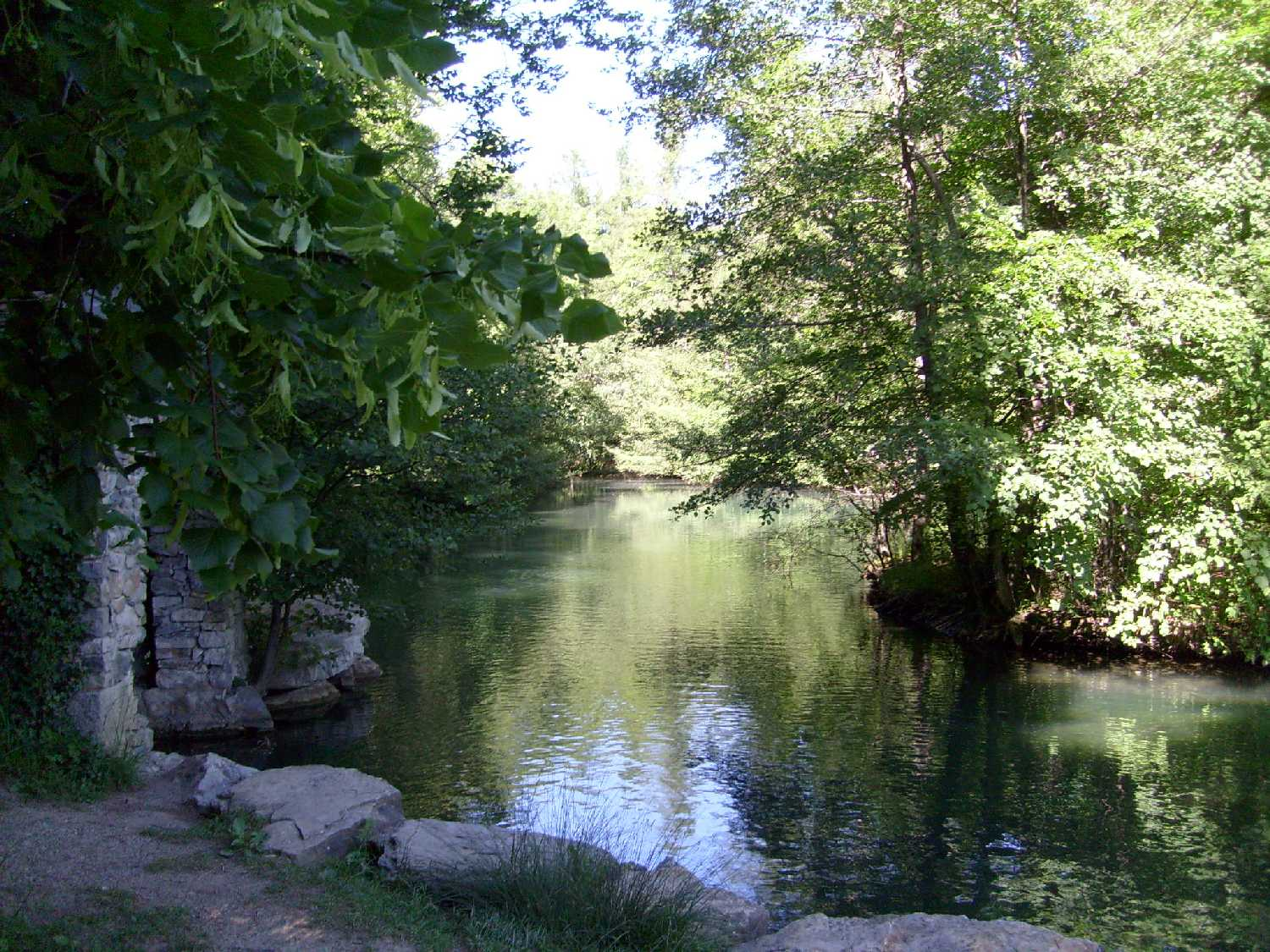 Lac de Charance( Gap, Hautes-Alpes)